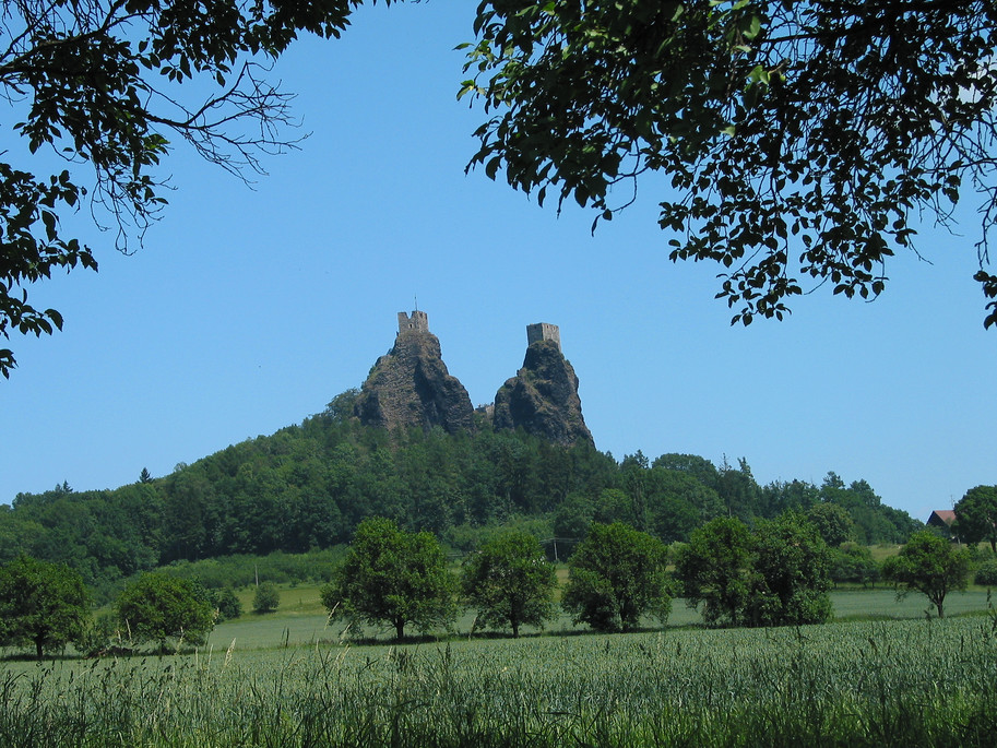 Burg Trosky